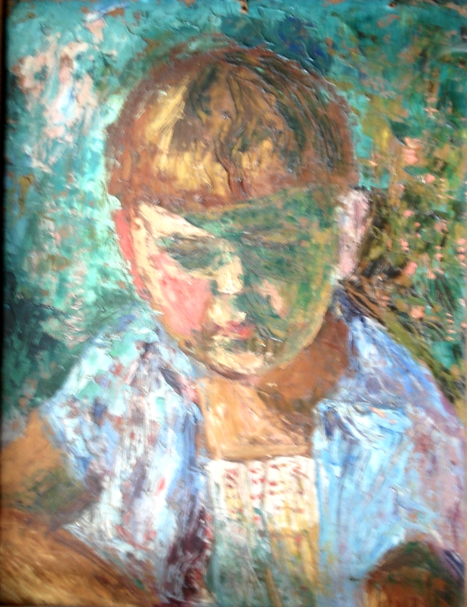 Lutek, koniec lat 50. XX w., olej na tekturze 32 x 24,5 cm